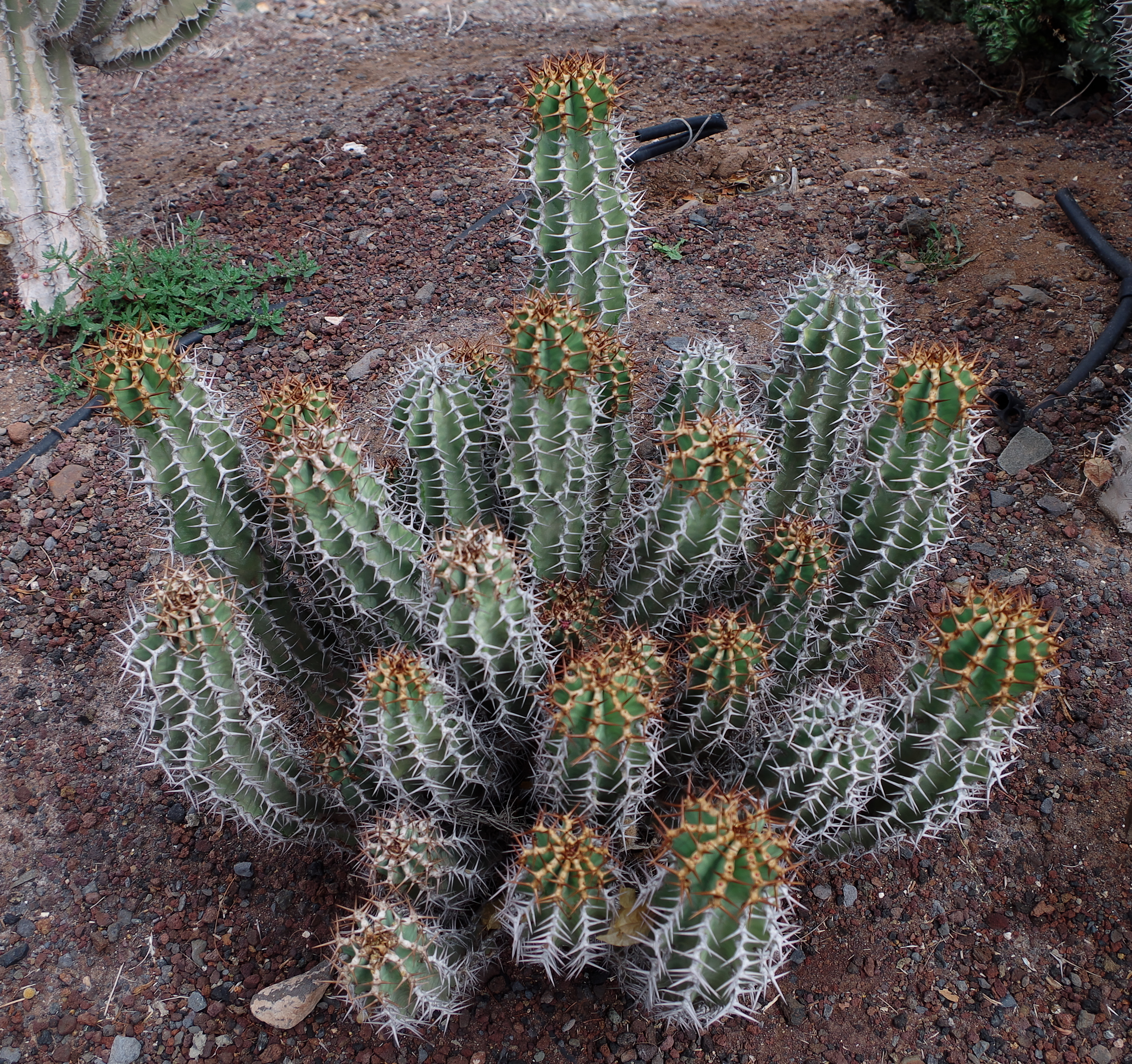 Eurphorbia avasmontana